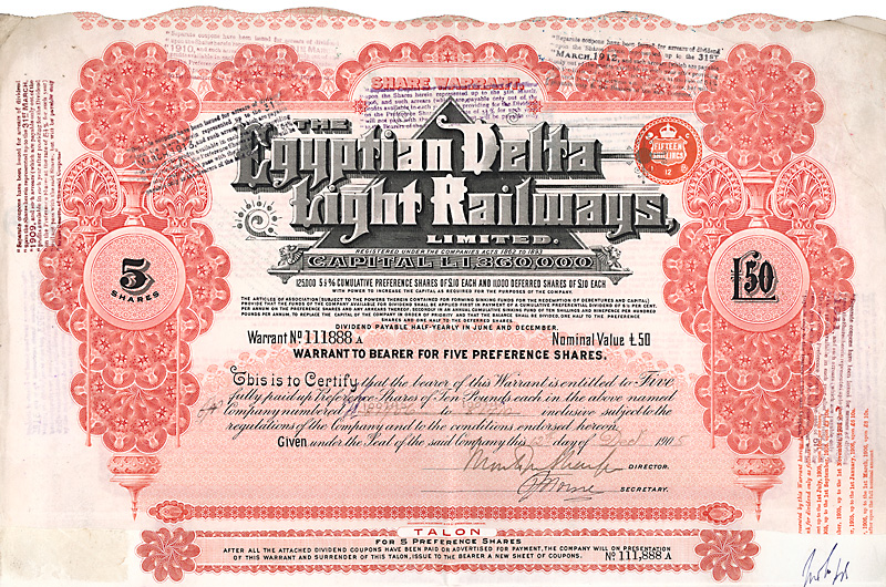 Pref. shares of the Egyptian Delta Light Railways from the 12. December 1905